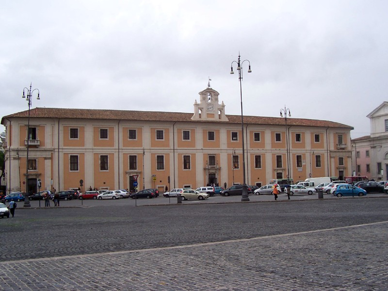 Roma - Ospedale di S. Giovanni. La cosiddetta Corsia nuova (1640) sulla piazza di S. Giovanni in Laterano.